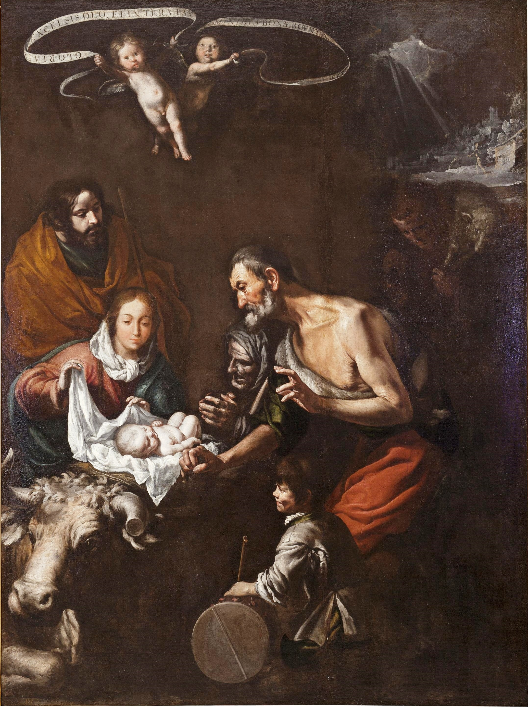 La obra representa el momento en que el Niño Jesús, al poco de nacer, fue adorado por los pastores de Belén, que habían sido avisados por un ángel del nacimiento del mesías prometido por Dios.